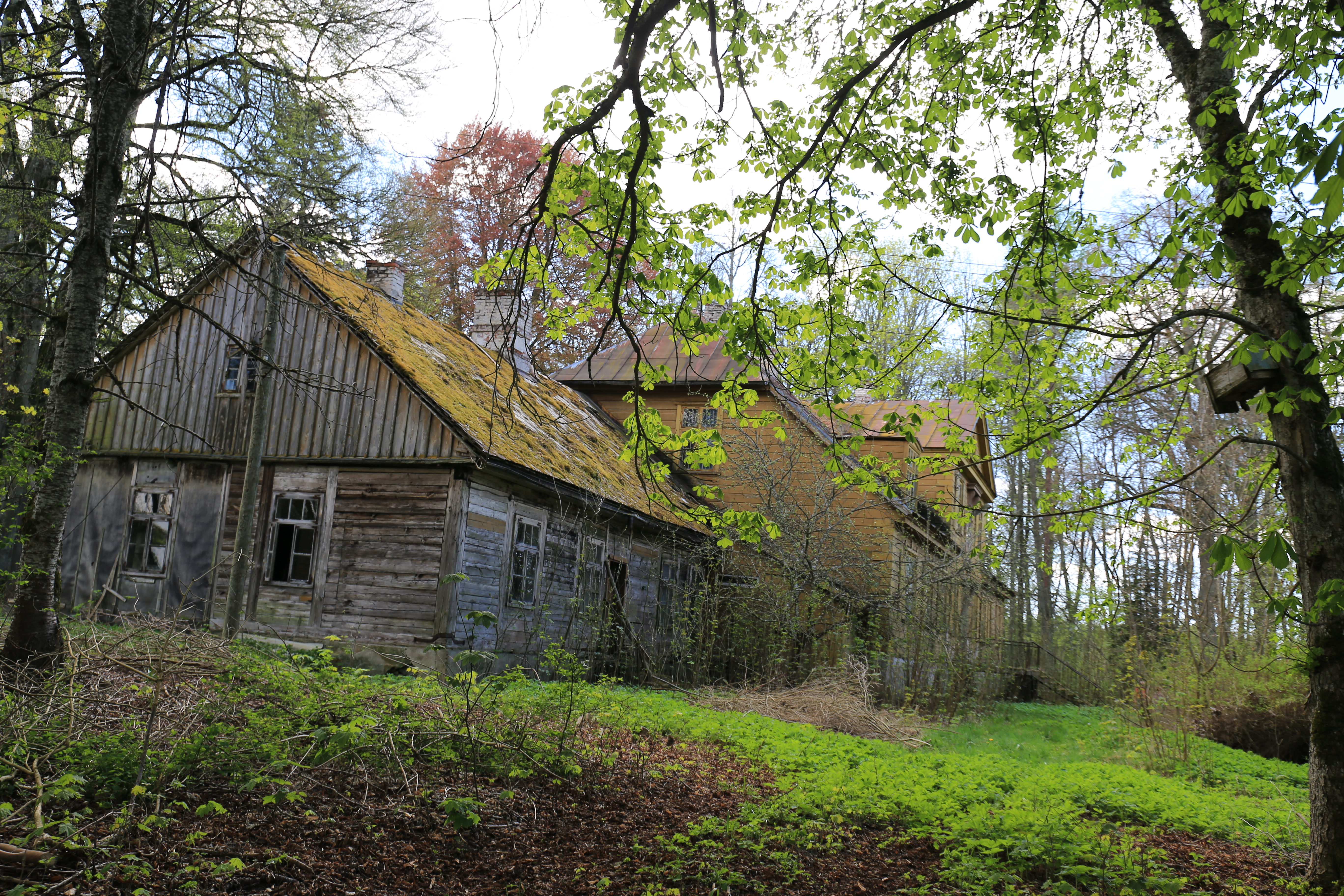 Jāmaiķu muiža / manor